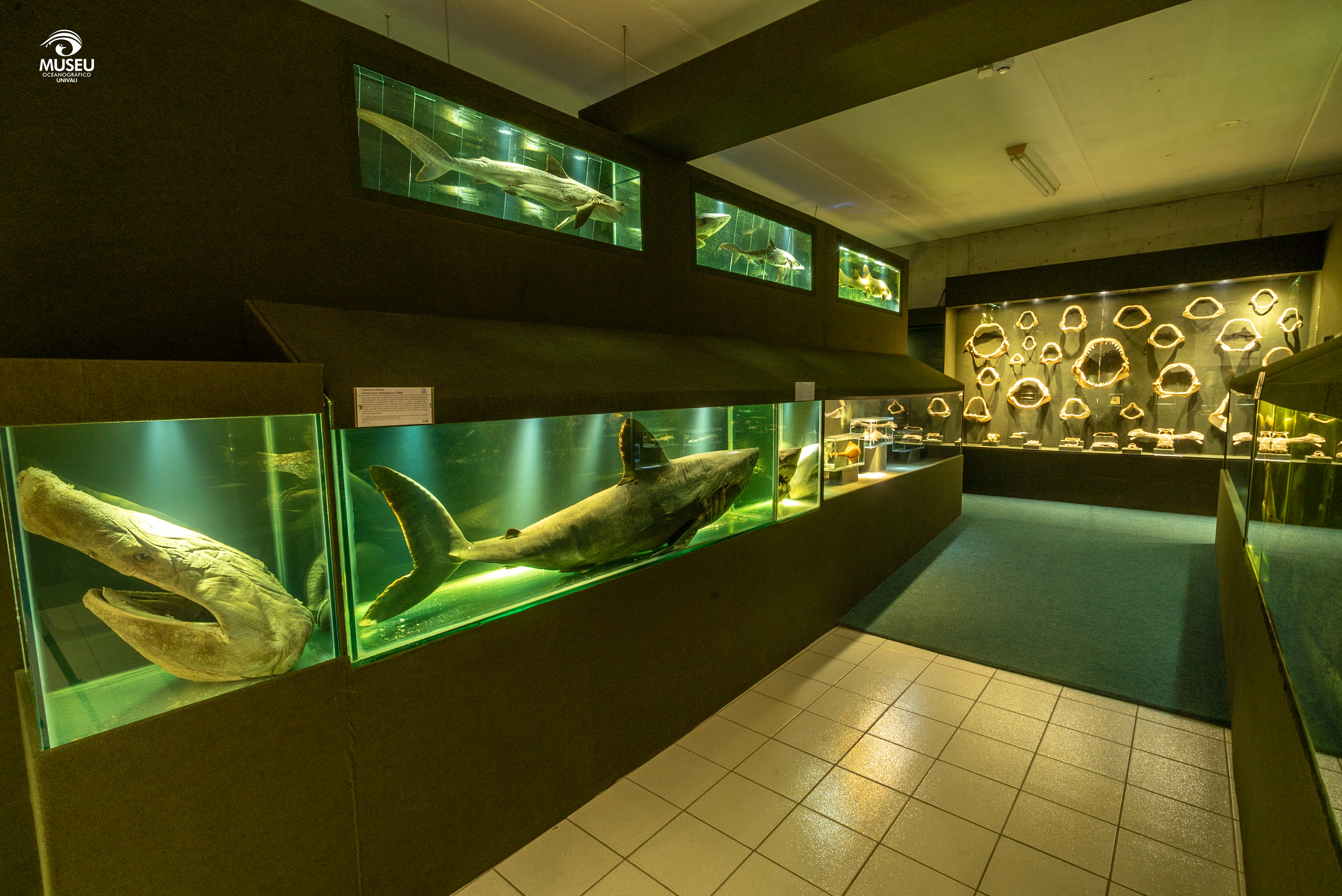 Vista parcial da Ala dos Peixes Cartilaginosos, no Museu Oceanográfico Univali, com tubarões conservados inteiros em tanques de vidro